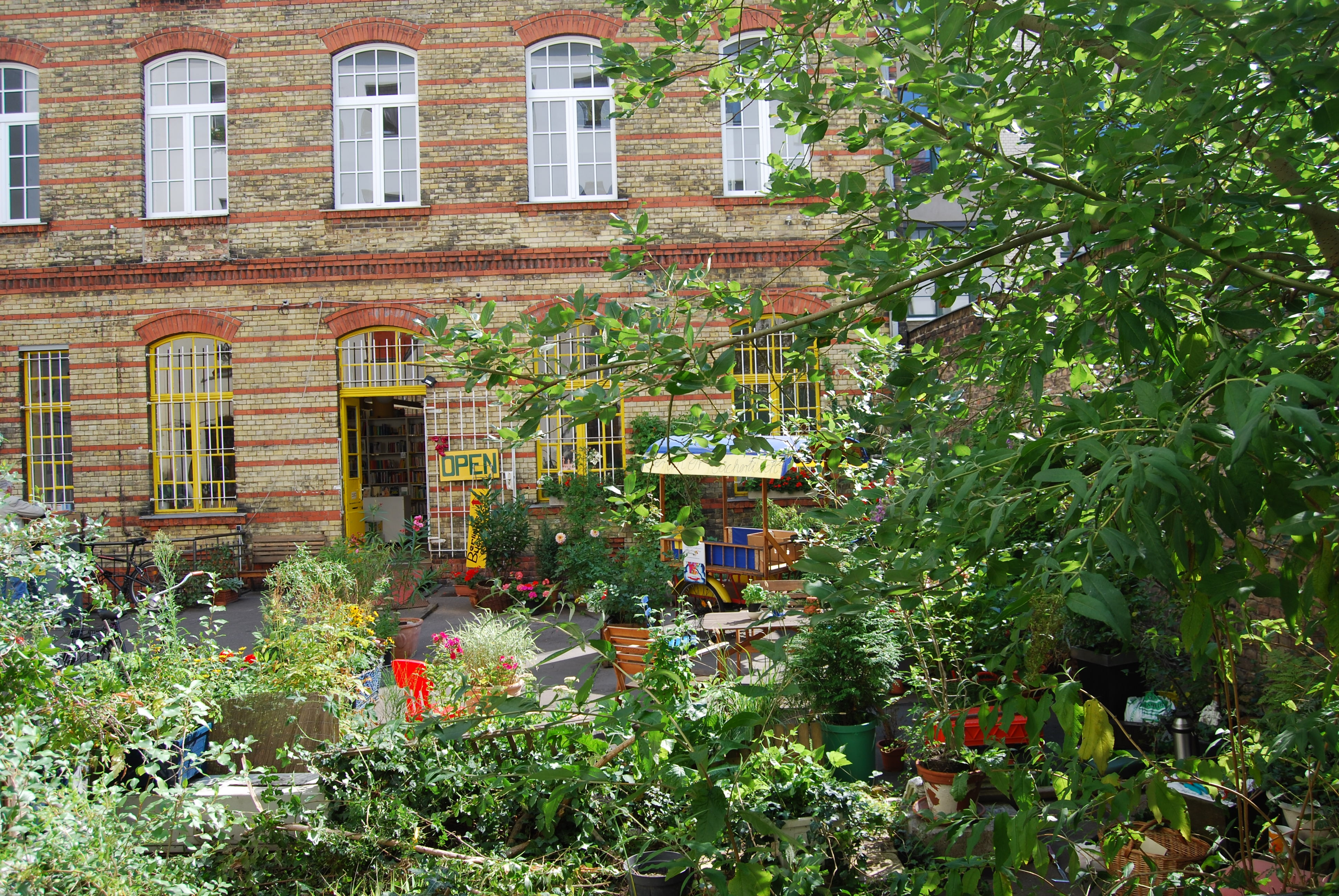 Hofgarten des Berliner Büchertisches e.V., Mehringdamm 51, 10961 Berlin